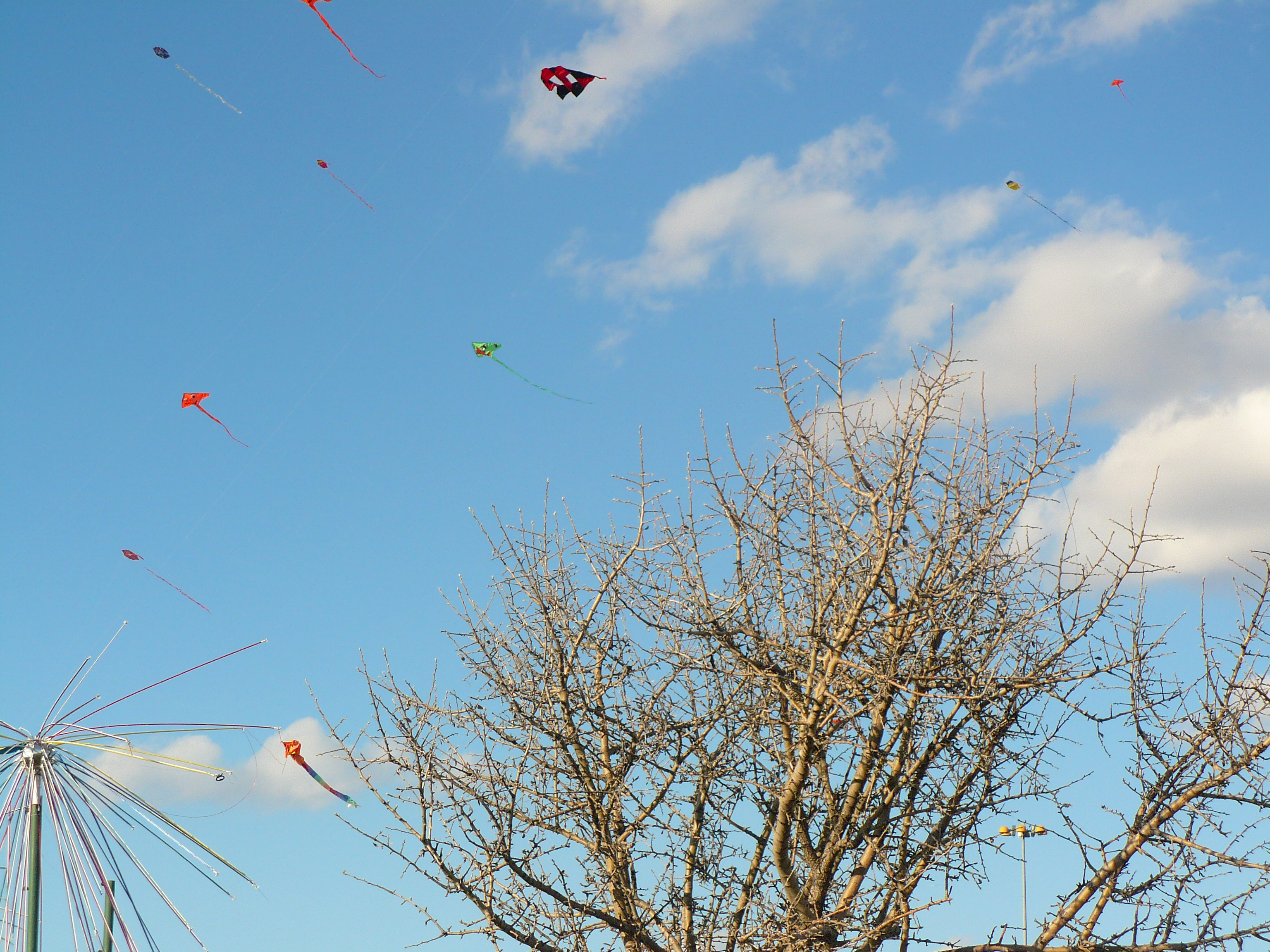 Ahlatlıbel - Çankaya - Ankara